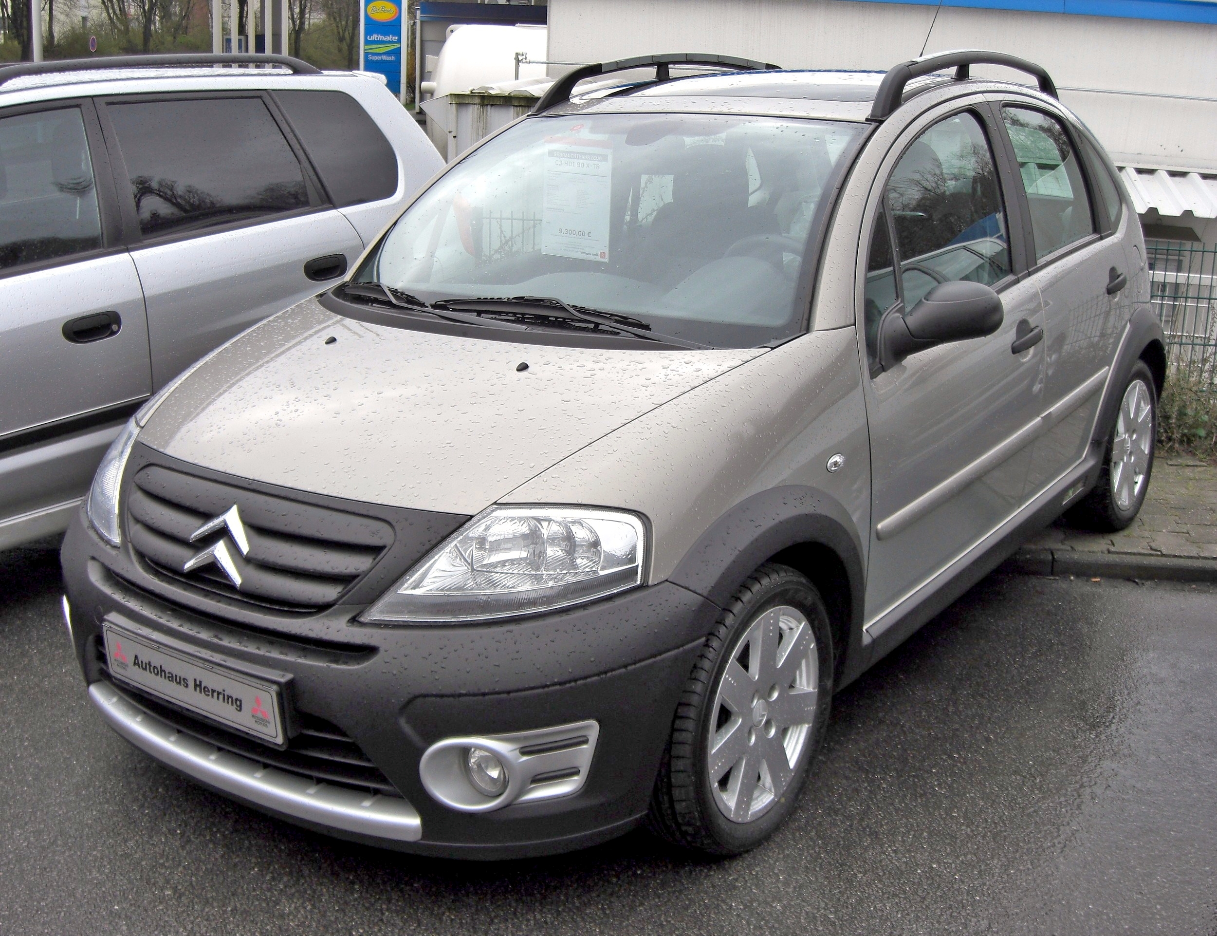 Citroen C3 X-TR